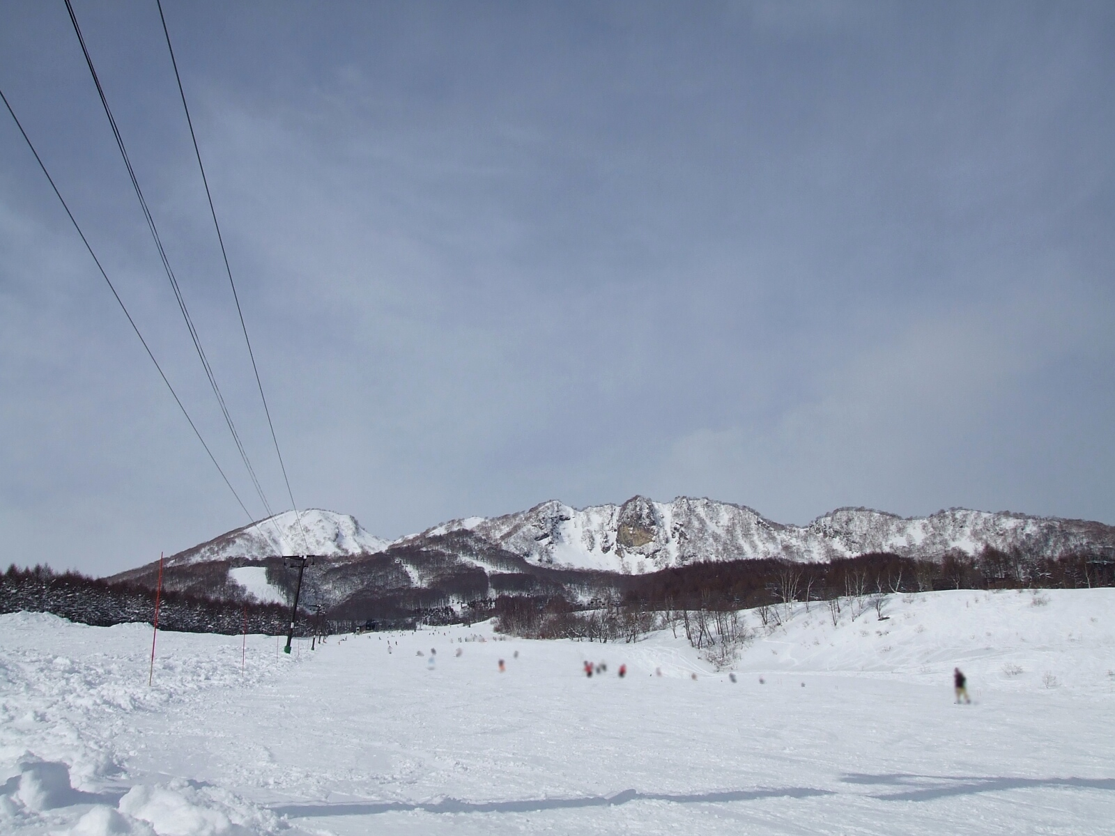 妙高杉ノ原スキー場。パノラマゲレンデ付近。